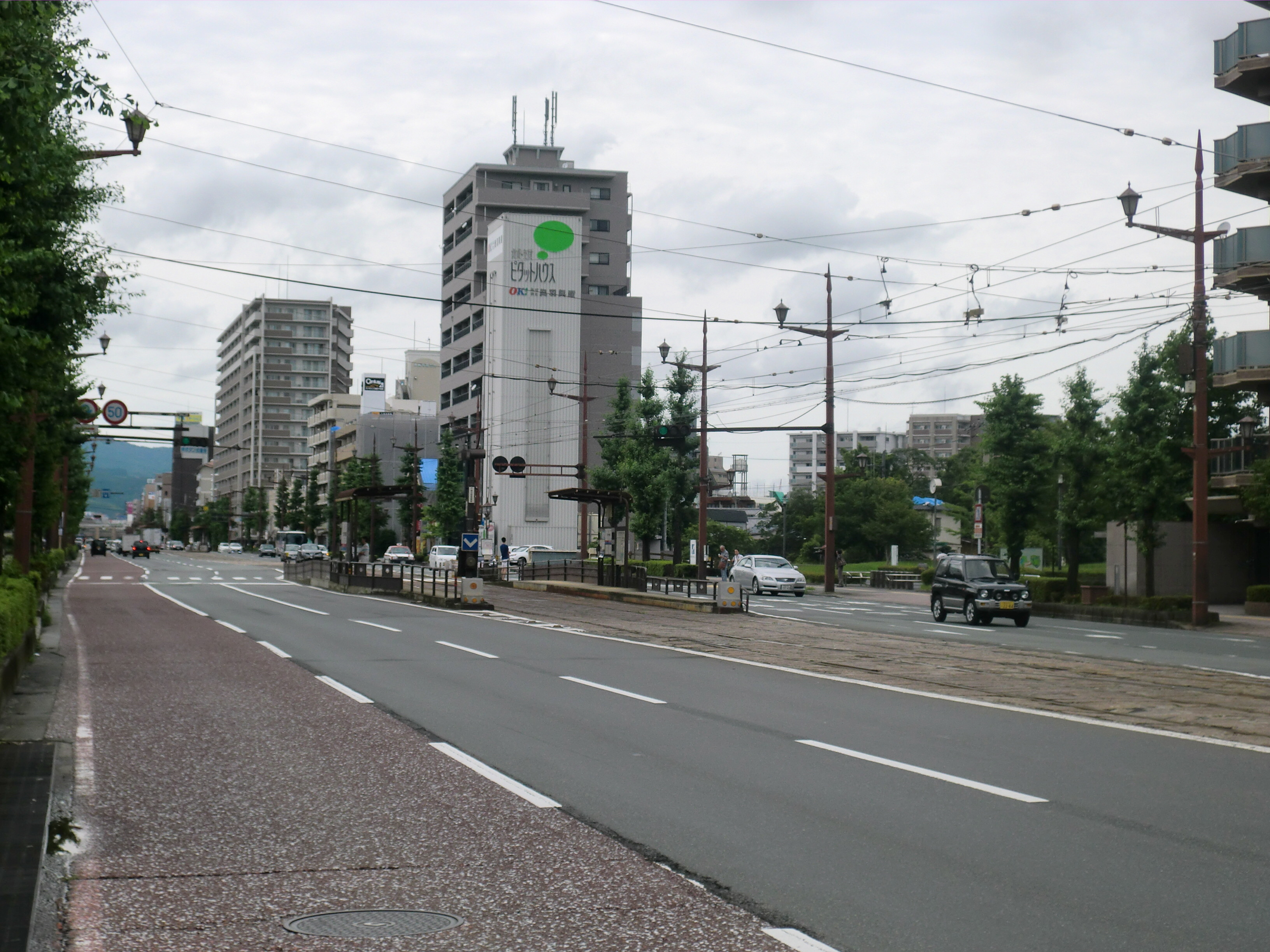 熊本市電市立体育館前停留場